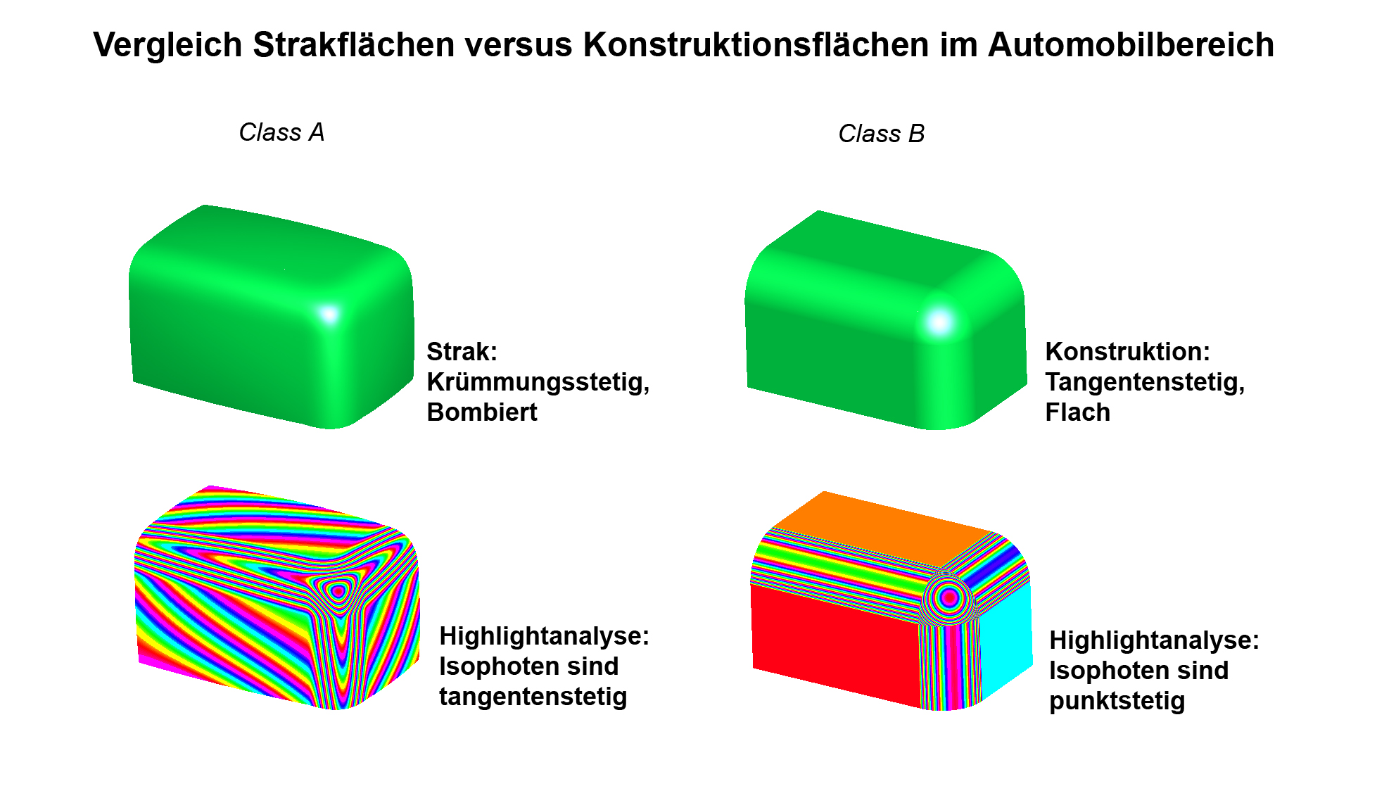 Vergleich Strakflächen (Class A) versus Konstruktionsflächen (Class B), Highlightanalyse